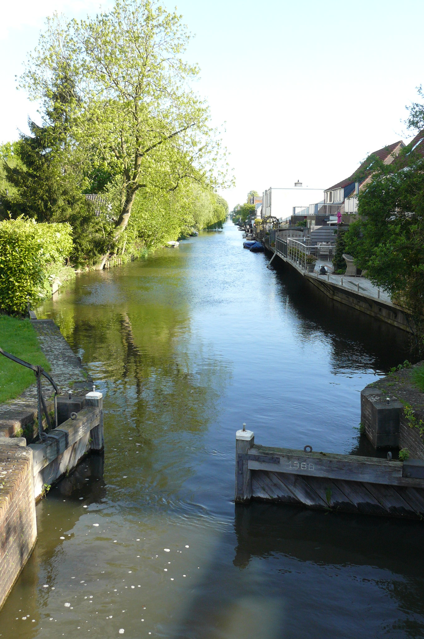 Zicht op de vaart vanaf de Zuidersluis. De foto is richting het noorden genomen.